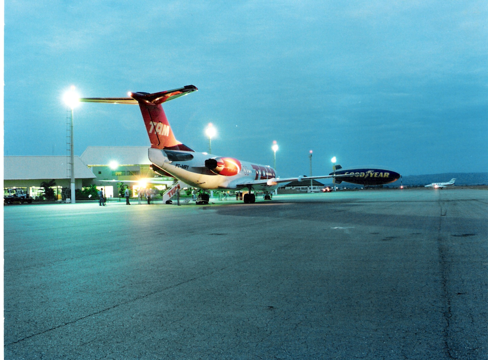 aeroporto_caldas_novas_crepusculo